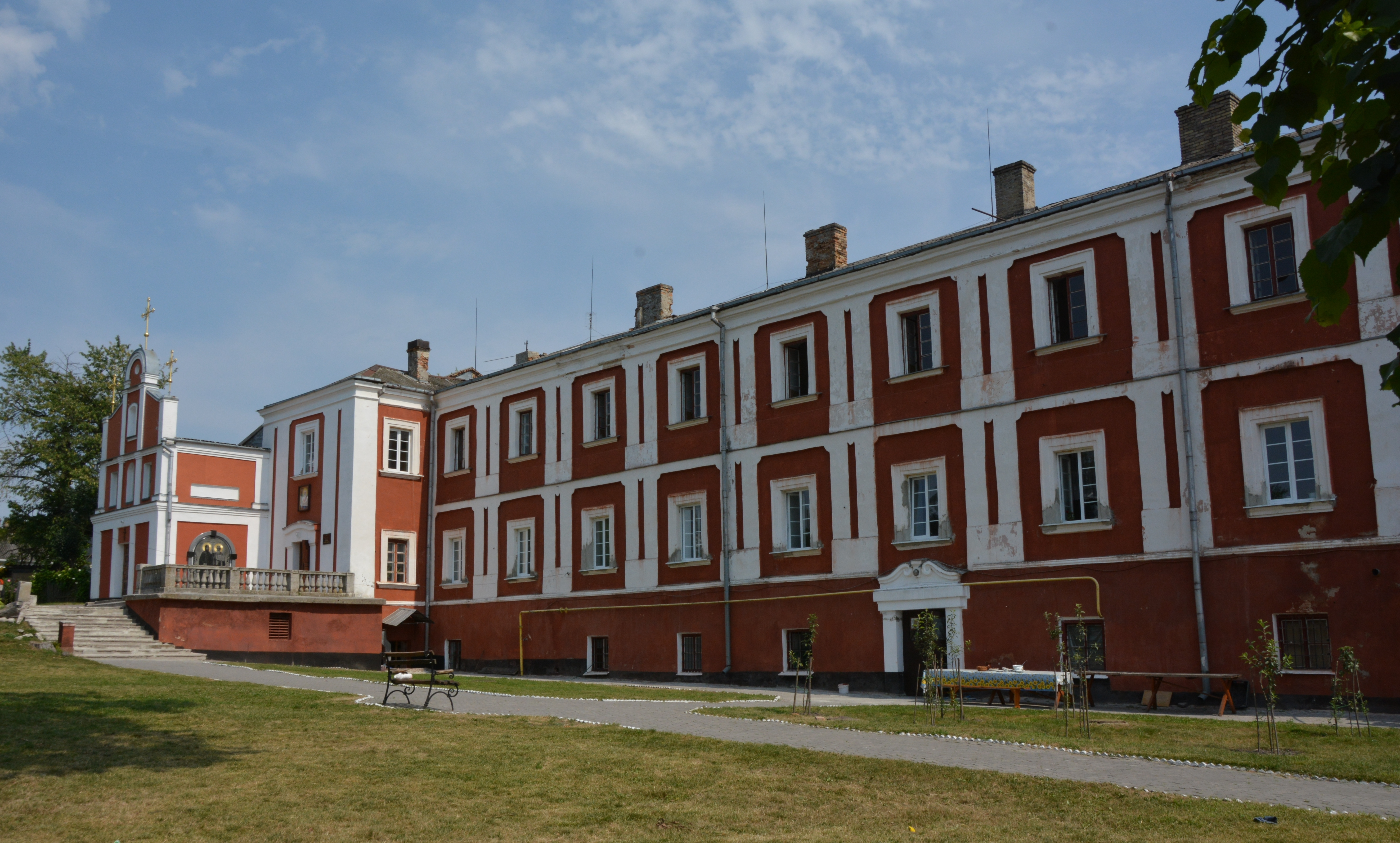 Монастир домініканів (мур.), Луцьк, вул. Драгоманова, 26